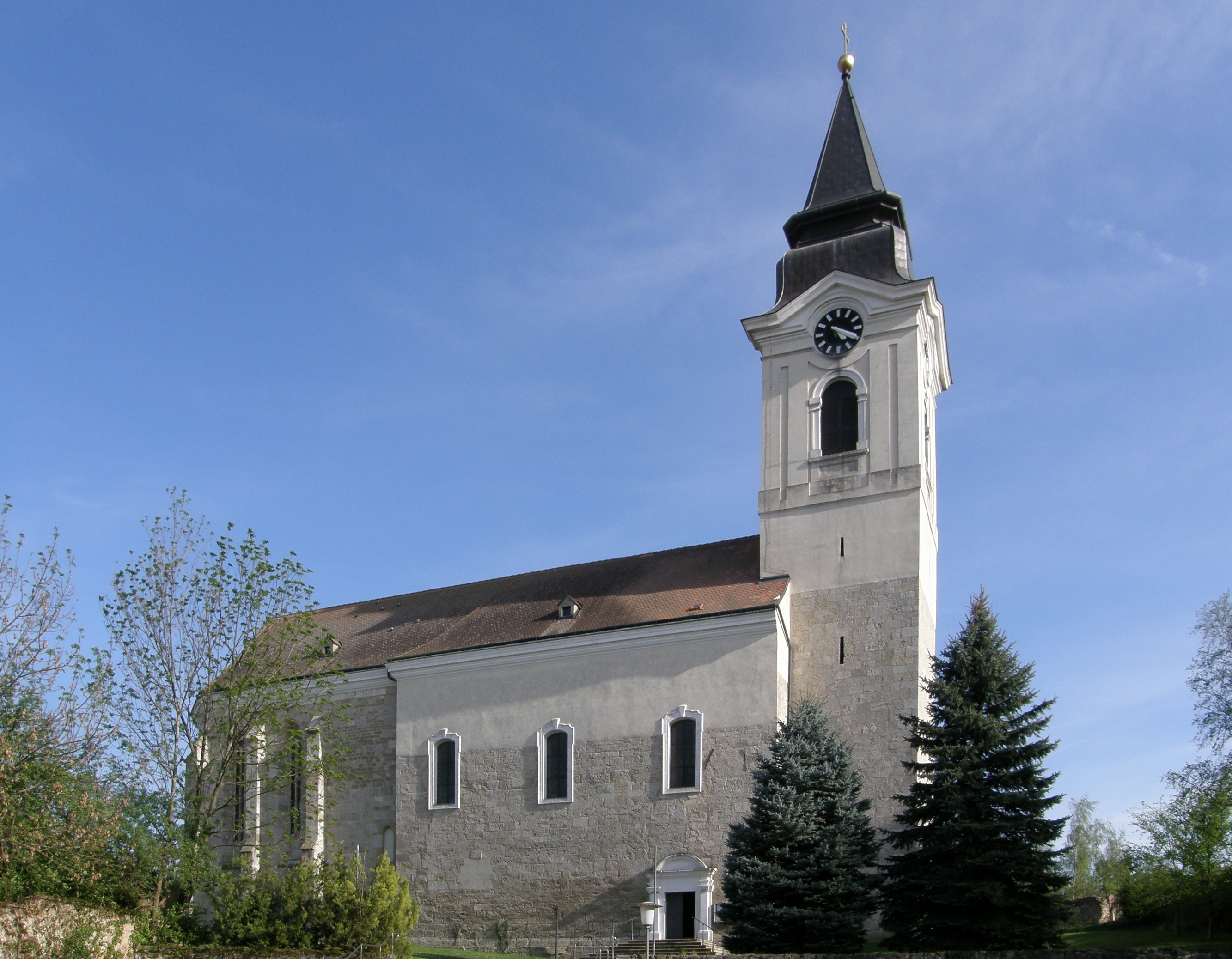 Kath. Pfarrkirche Maria Himmelfahrt